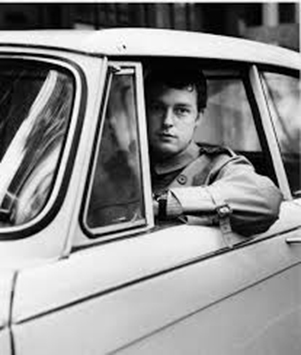 Trino Flothuis Foto: Steye Raviez Uit: 'De beste mensenfotograaf die ik ken', Foto's en tekst Steye Raviez (een uitgave van: Aldus Boek Compagnie)